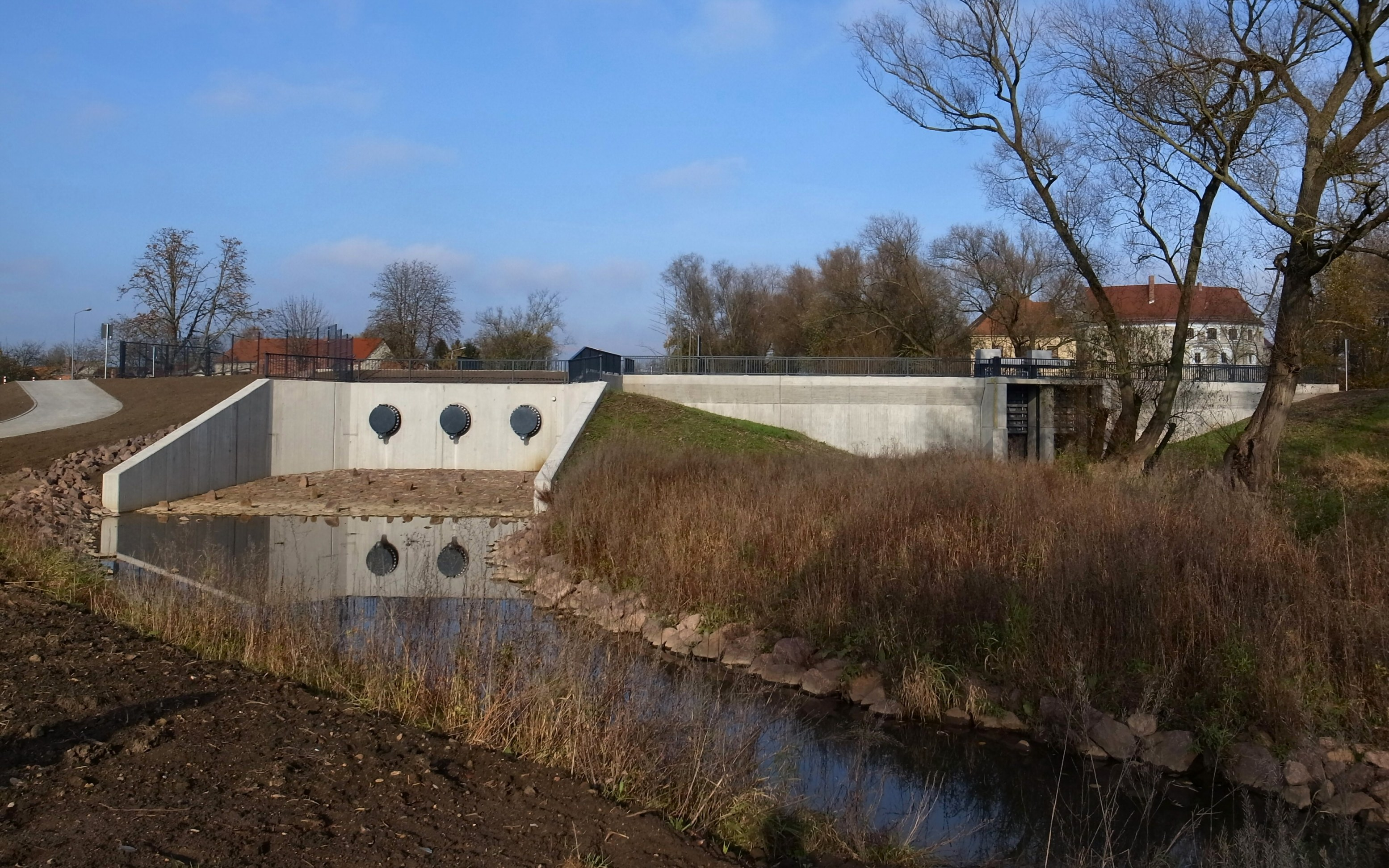 Hochwasserschutzanlage Rossel-Schöpfwerk an der Wasserburg Roßlau [1]